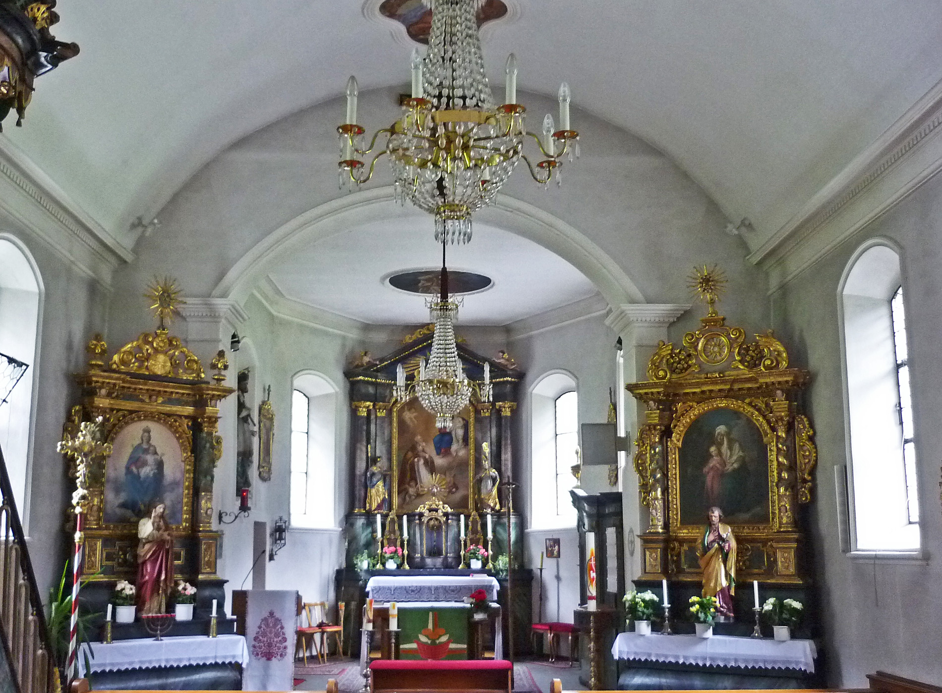 Kuratienkirche St. Nikolaus in Gortipohl (Montafon)